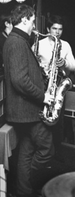 restaurant Kongen, interiør, Club 7, podium, musikere, soul-band, The Sapphires. Bildet viser soul-bandet Sapphires på Kongen, og vi ser til venstre Arild Wickstrøm (orgel), Knut Riisnes (tenor), Carl Magnus "Calle" Neumann (alt) og Hans Knudsen (Stan Nuts# (bariton). I høyre billedkant øverst bakhodet til sangeren "Little" Earl Wilson og helt i forgrunnen bakhodet til trommeslager Tom Karlsen.